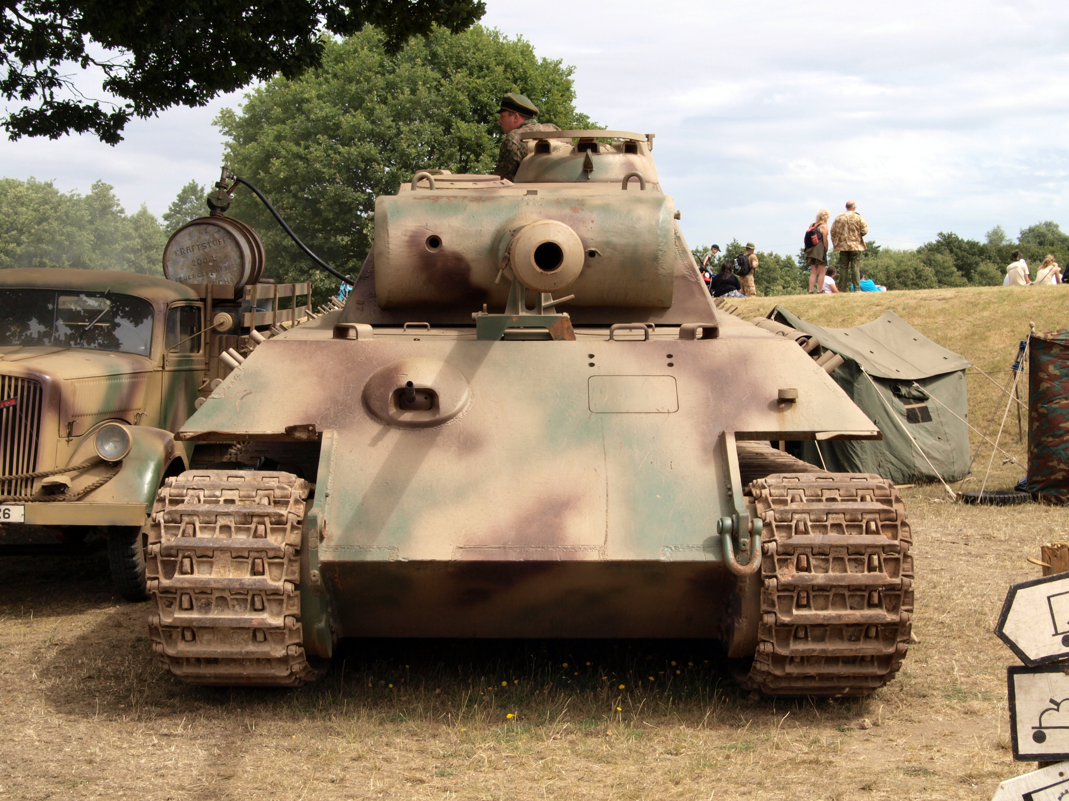 Panzer V, Panther